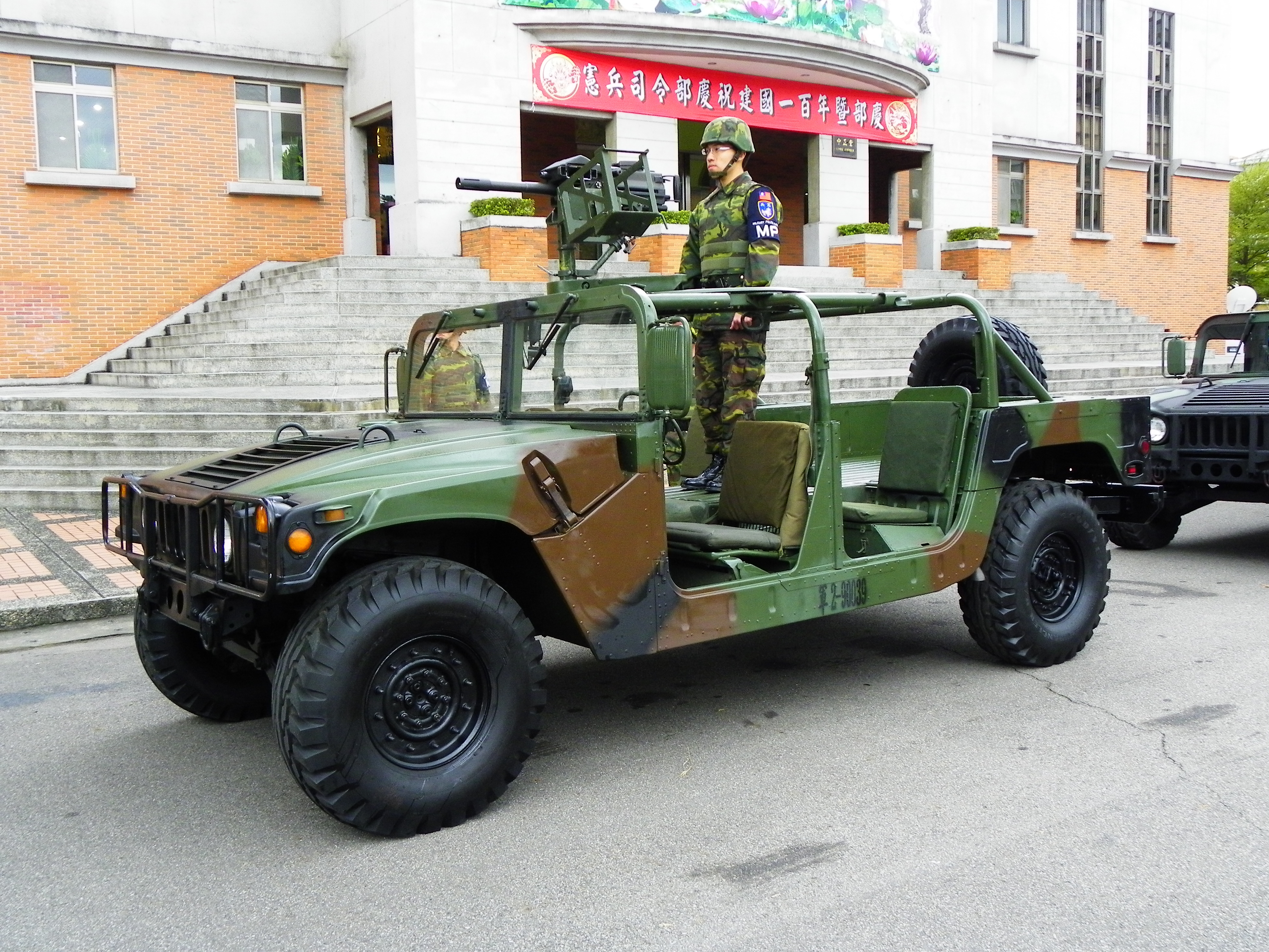 中華民國憲兵紀念日校閱前，停放於憲兵司令部中正堂外的悍馬槍榴彈車。